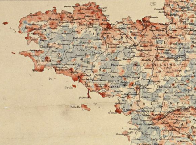 Carte des densités de population en Bretagne en 1887, issue de la carte de France